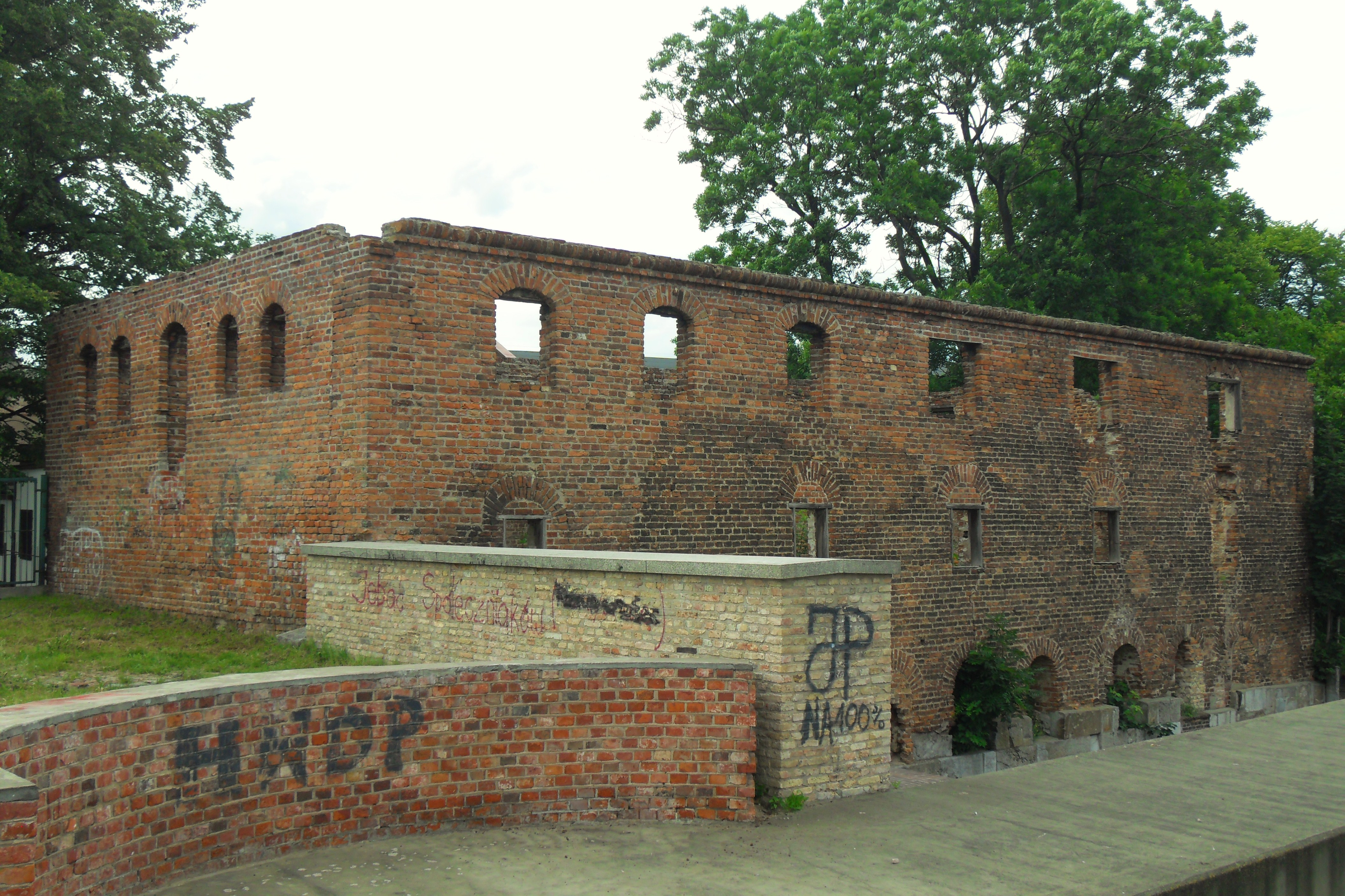 Gdańsk. Młyn przy Śluzie Kamiennej.